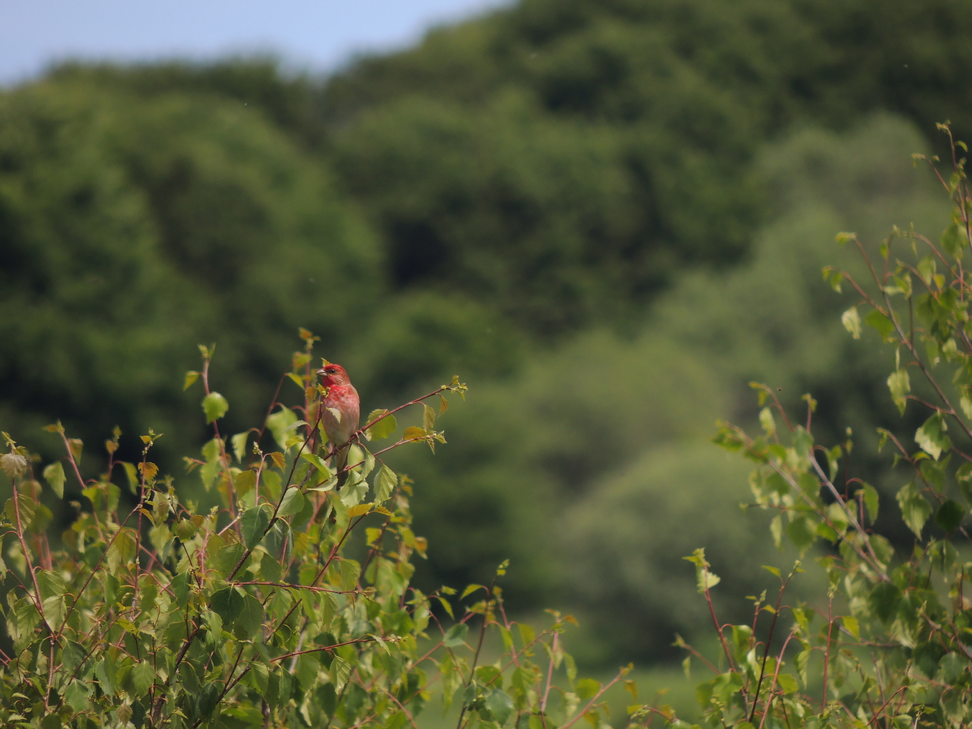 Srpski naziv rumenka Opis vrste D.t. 13,5-15 cm. Rasprostranjena je u severnoj, istočnoj i delovima centralne Evrope, delovima male Azije i Kavkaza kao i u širokom pojasu umerene Azije. Deo populacije je migratoran i zimu provodi u južnoj Aziji. Staništa su joj obodi i proplanci vlažnih listopadnih šuma, žbunje i šumarci vrbe, breze i jove uz reke i močvare na različitim nadmorskim visinama. Tokom zimovanja je prisutna u različitim staništima. Gnezda gradi na drveću. Hrani se semenjem različitih vrsta biljaka i insektima. U Srbiji predstavlja novootktivenu i veoma retku gnezdaricu planinskih područja na jugozapadu zemlje (Pešterska visoravan) čija brojnost populacije još uvek nije procenjena. Status zaštite vrste IUCN crvena lista - Kategorija LC; Ptice od posebnog značaja za zaštitu u Evropi: Non SPEC; Konvencija o očuvanju evropske divlje flore i faune i prirodnih staništa - Annex I; Pravilnik o proglašenju i zaštiti strogo zaštićenih i zaštićenih divljih vrsta biljaka, životinja i gljiva: Prilog I Strogo zaštićene divlje vrste biljaka, životinja i gljiva